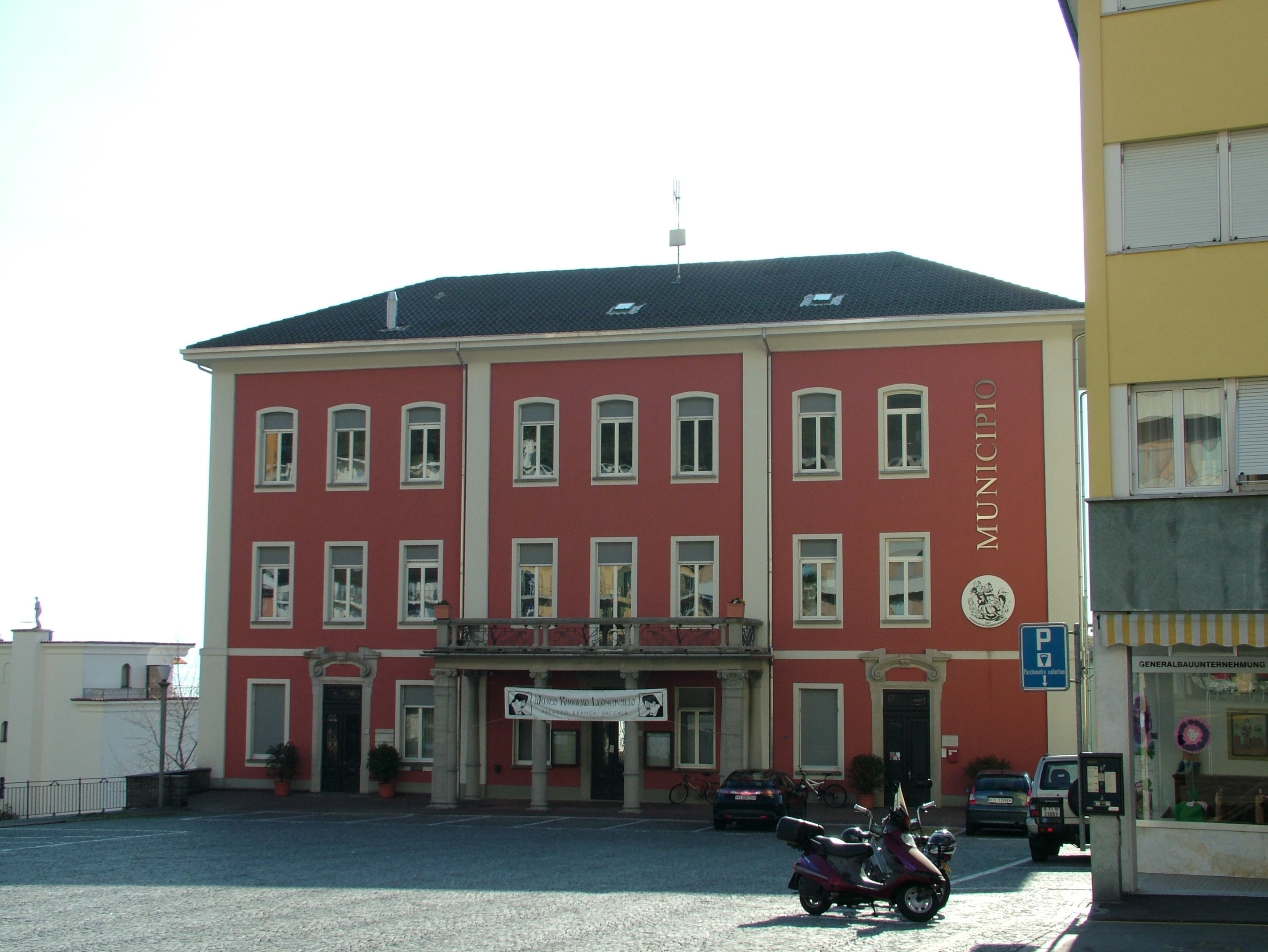 Brissago, Schweiz, Lago Maggiore, die Gemeindeverwaltung